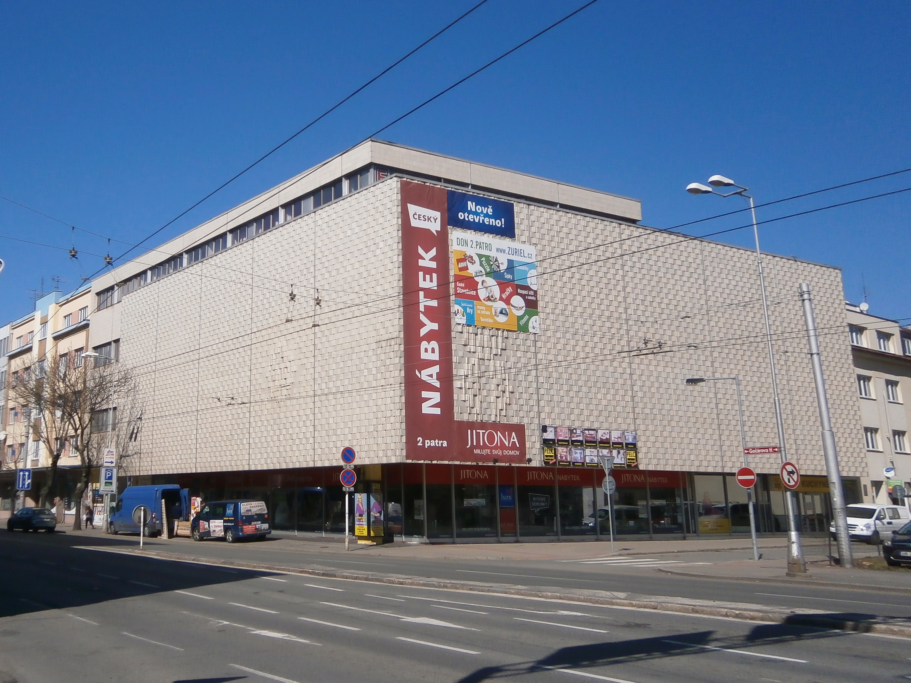 Módní dům Don (Hradec Králové, Gočárova třída 1517/26)